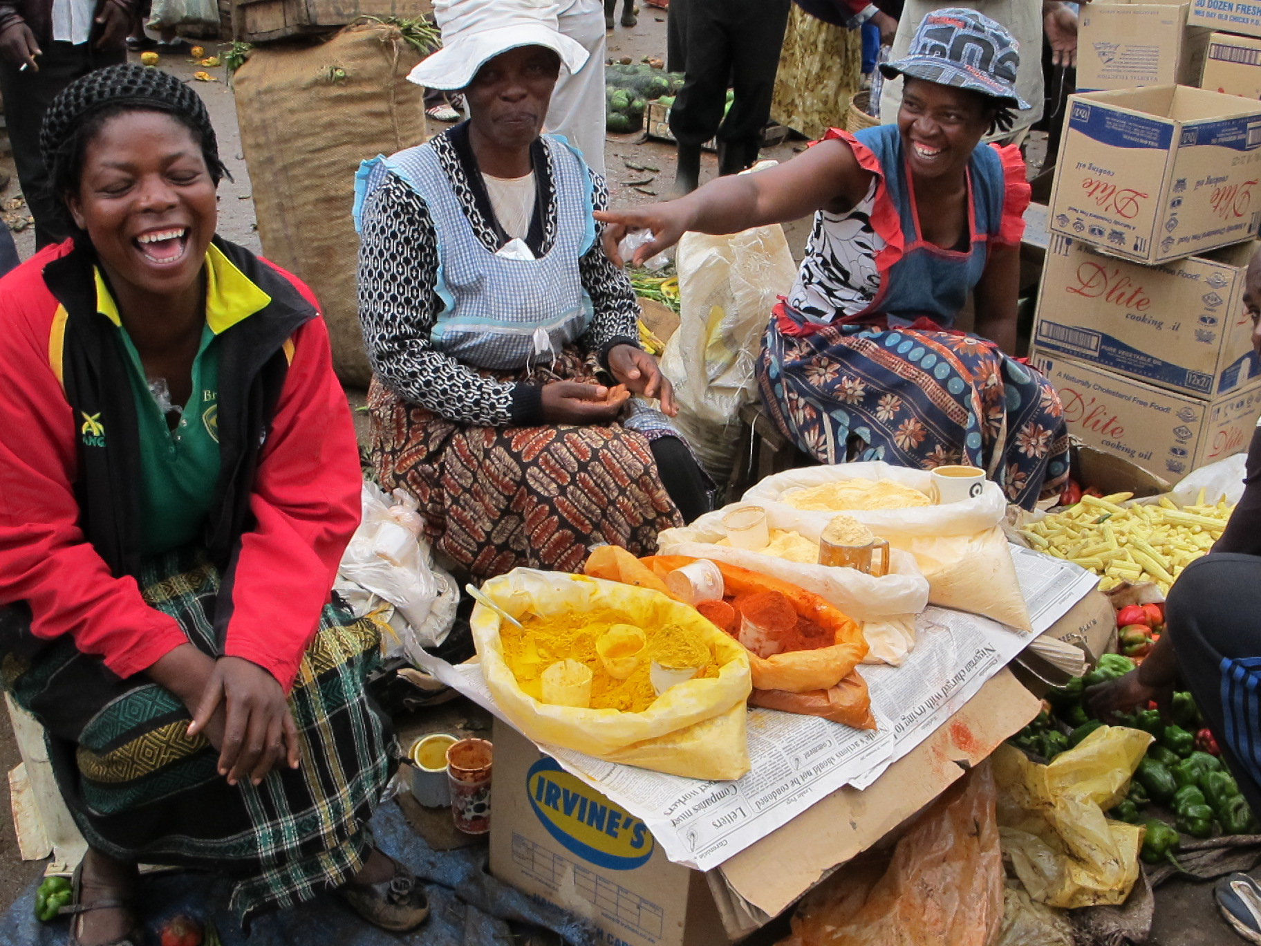 Mbare market, Harare.